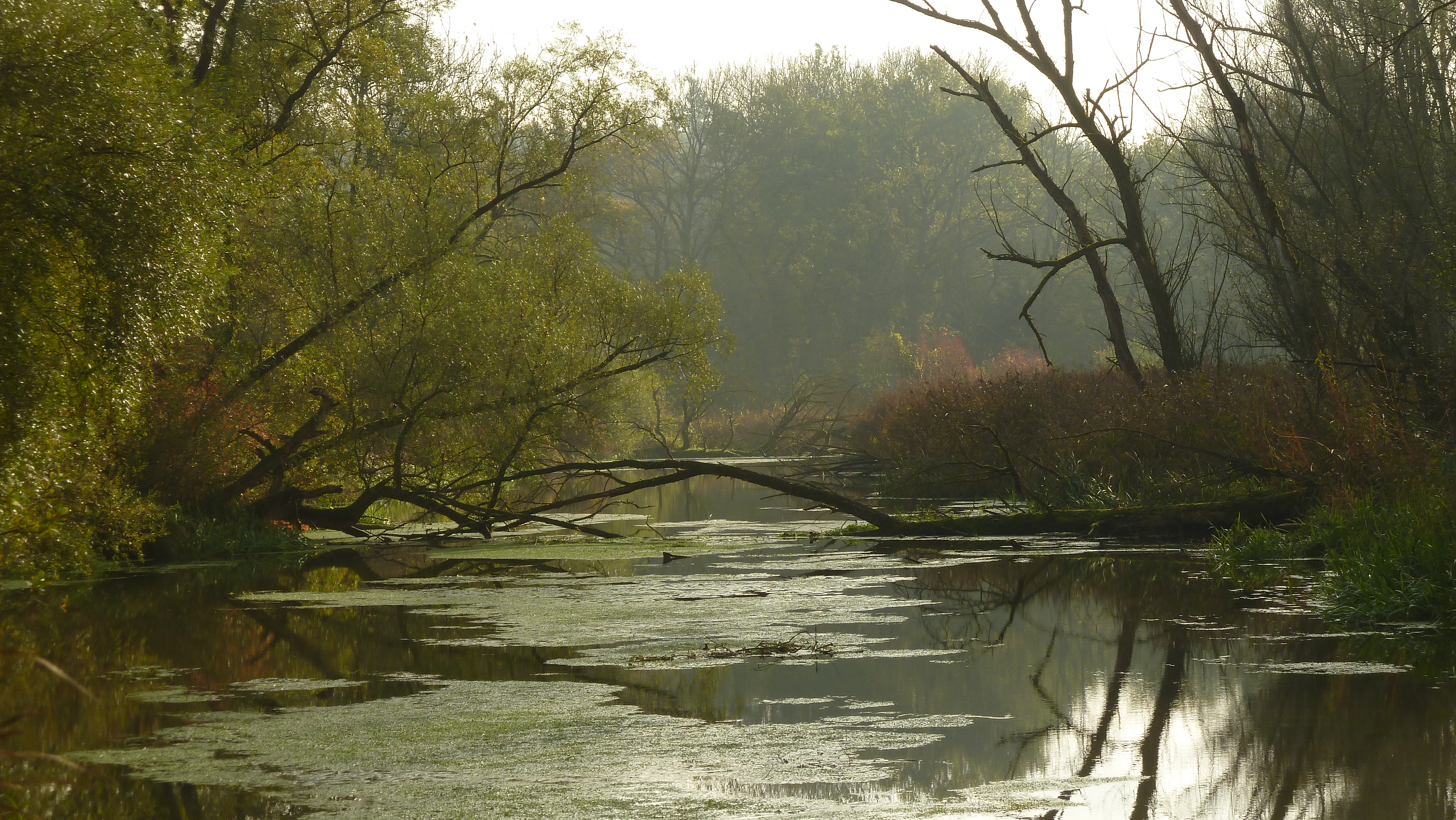 7635-301 555521989 Ampertal Oberbayern